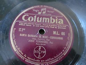 Santa Bárbara de Nexe-corridinho da autoria de José Ferreiro,pelo autor